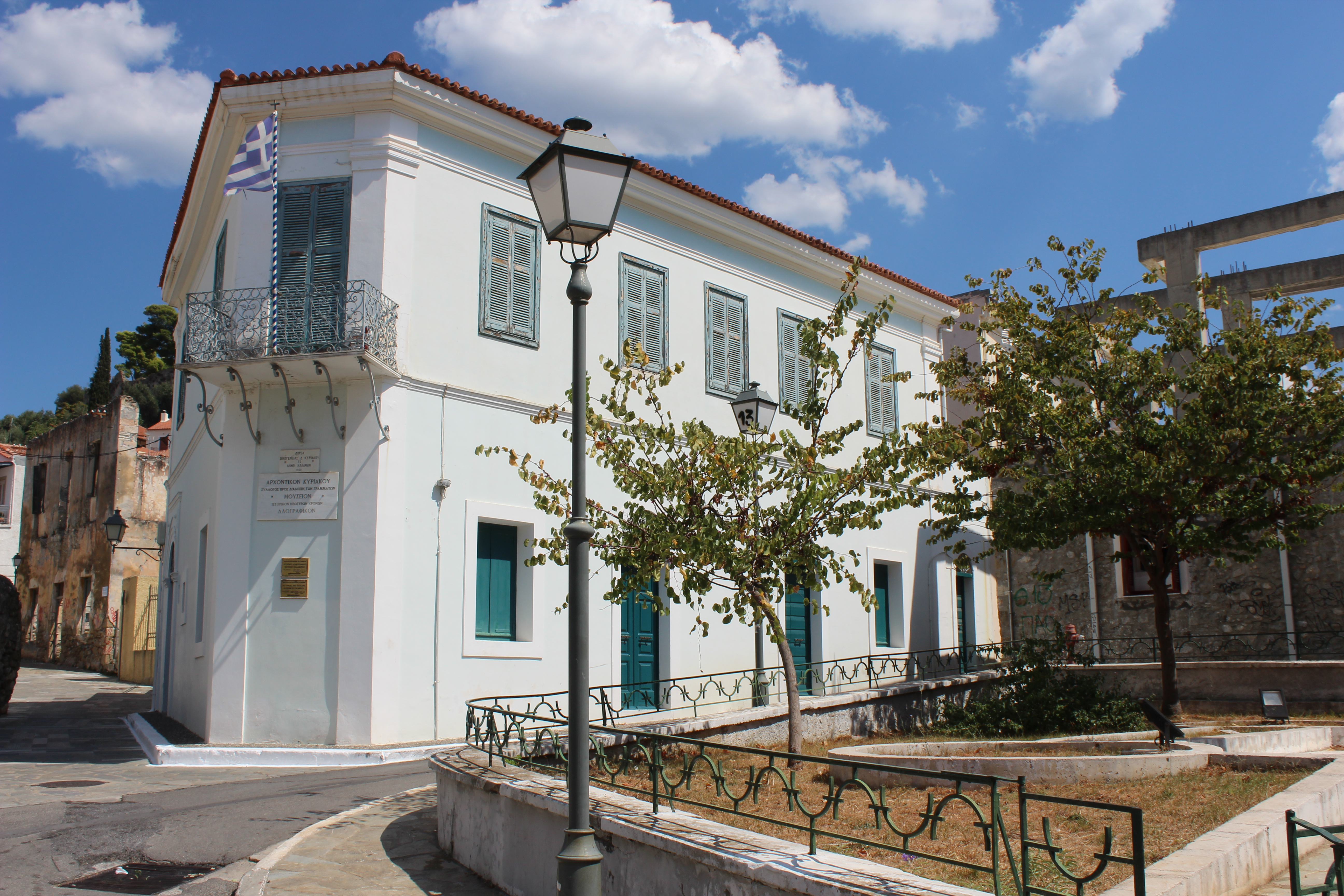 Λαογραφικό Μουσείο Καλαμάτας - Αρχοντικό Κυριακού«Λαογραφικό Μουσείο Καλαμάτας - Αρχοντικό Κυριακού»